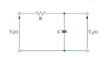 Integratore a resistenza-capacità